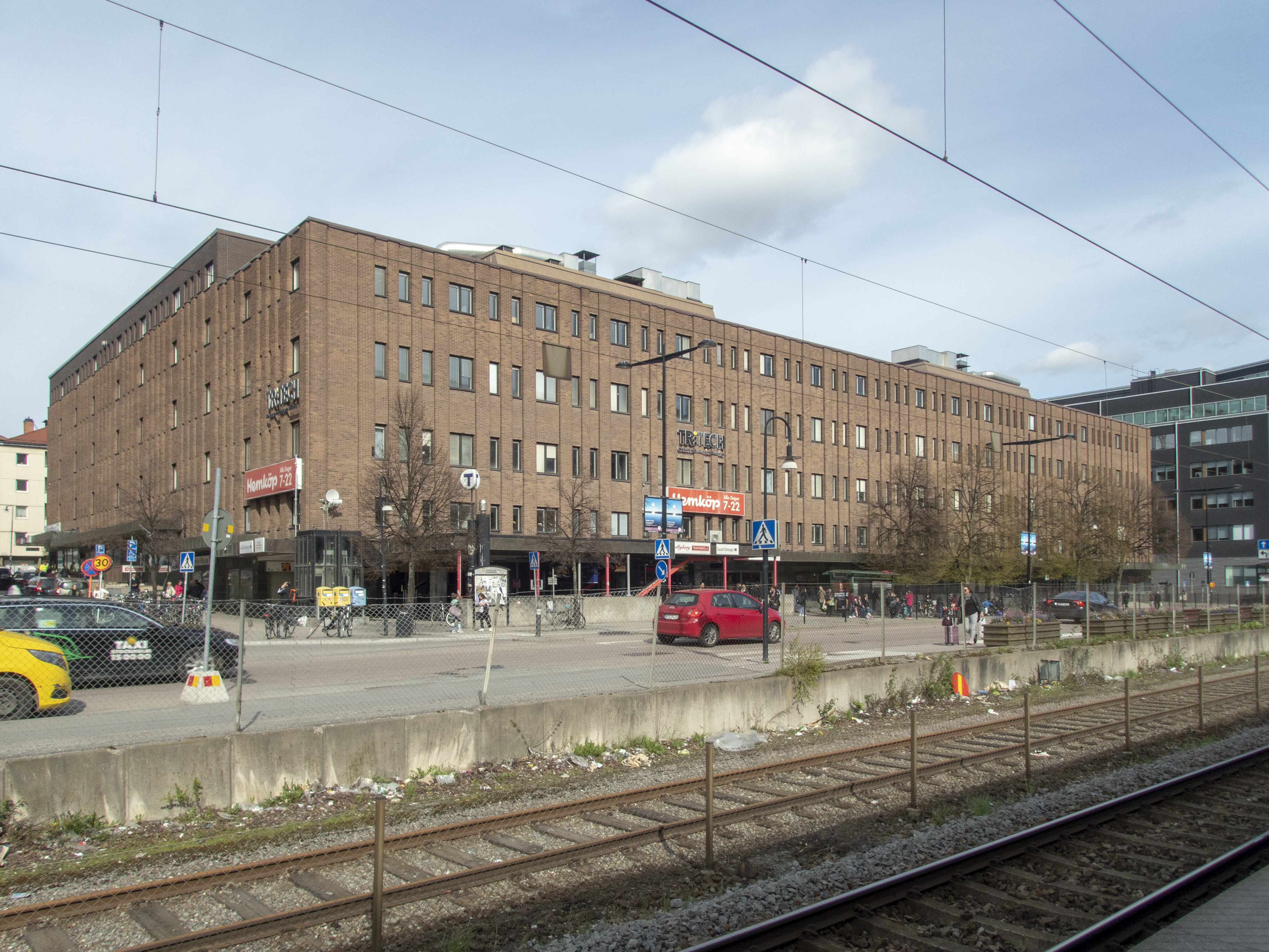 Godset 4, Järnvägsgatan 2-10 Sundbyberg . Nybyggnadsår 1977. Arkitekt Rolf Runefelt.